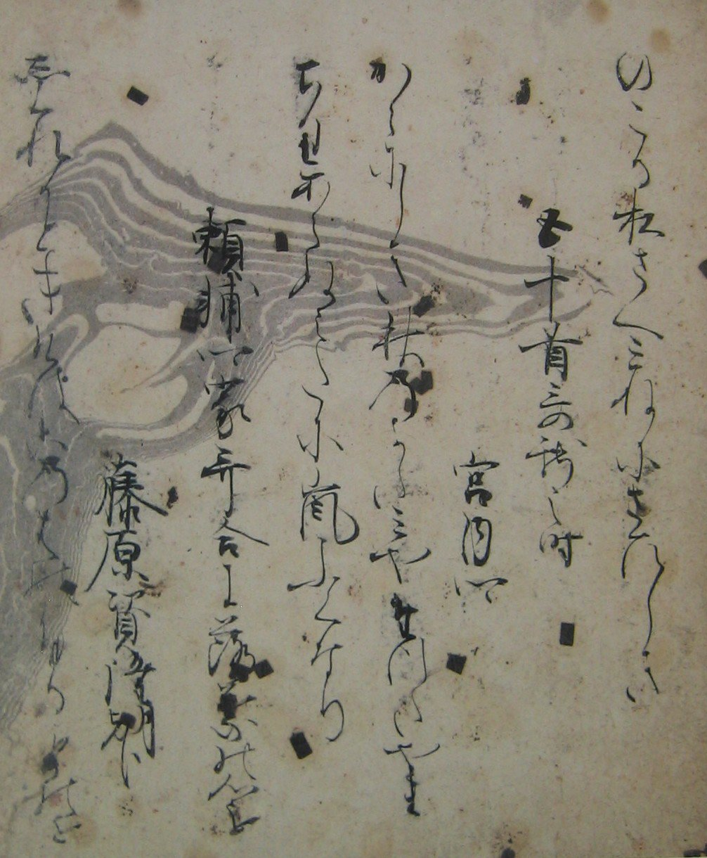 Calligrafia del Shin Kokin Wakashū